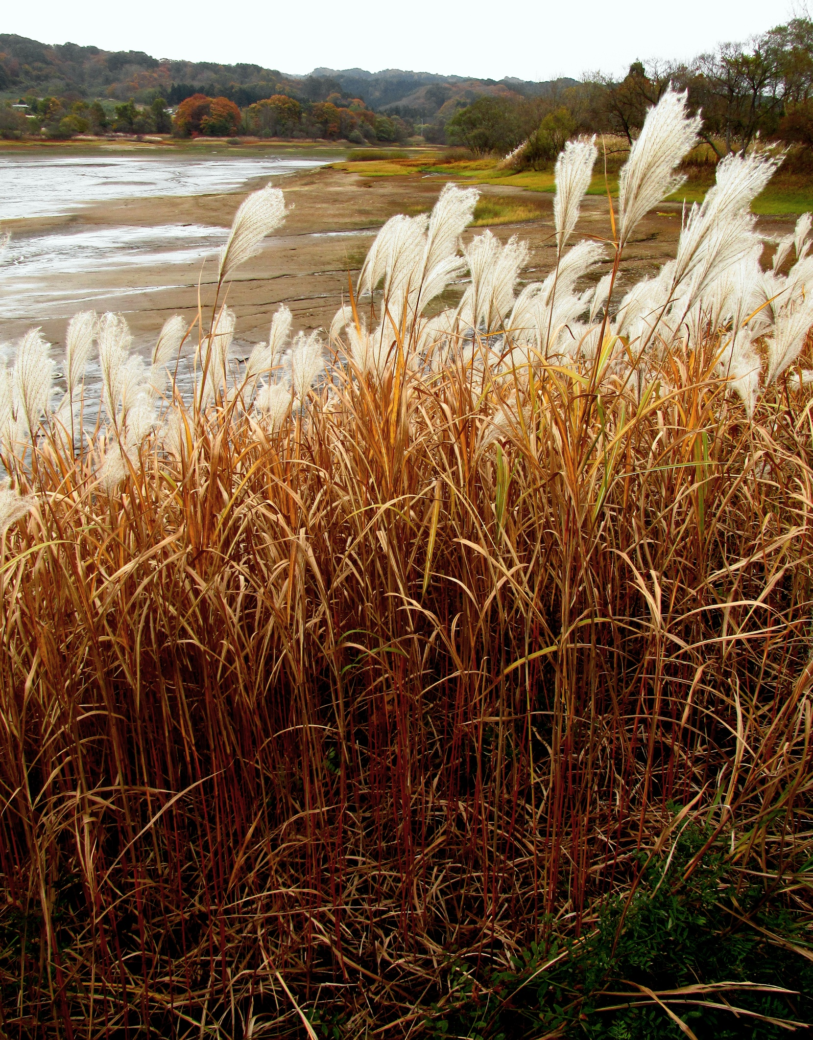 カヤ,茅,萱,茅葺屋根（かやぶきやね）の部材として使用されるカヤ,青森県五所川原市神山「長橋溜池」,青森県,日本国